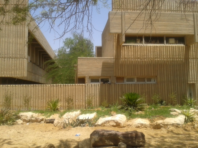 התיכון לחינוך סביבתי